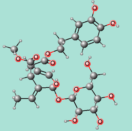 3D molecule of Oleuropein